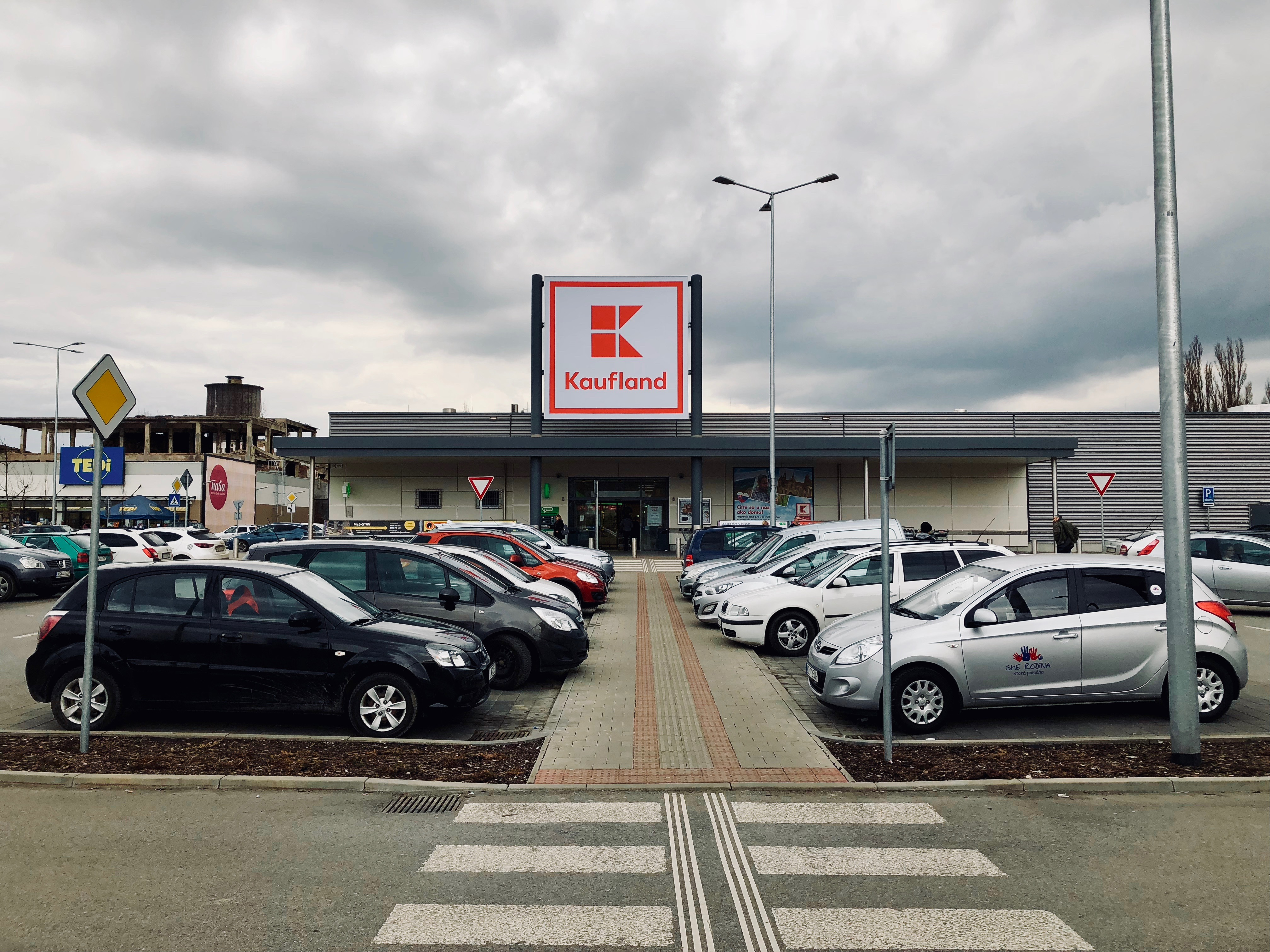 Kaufland NG Naša Košice